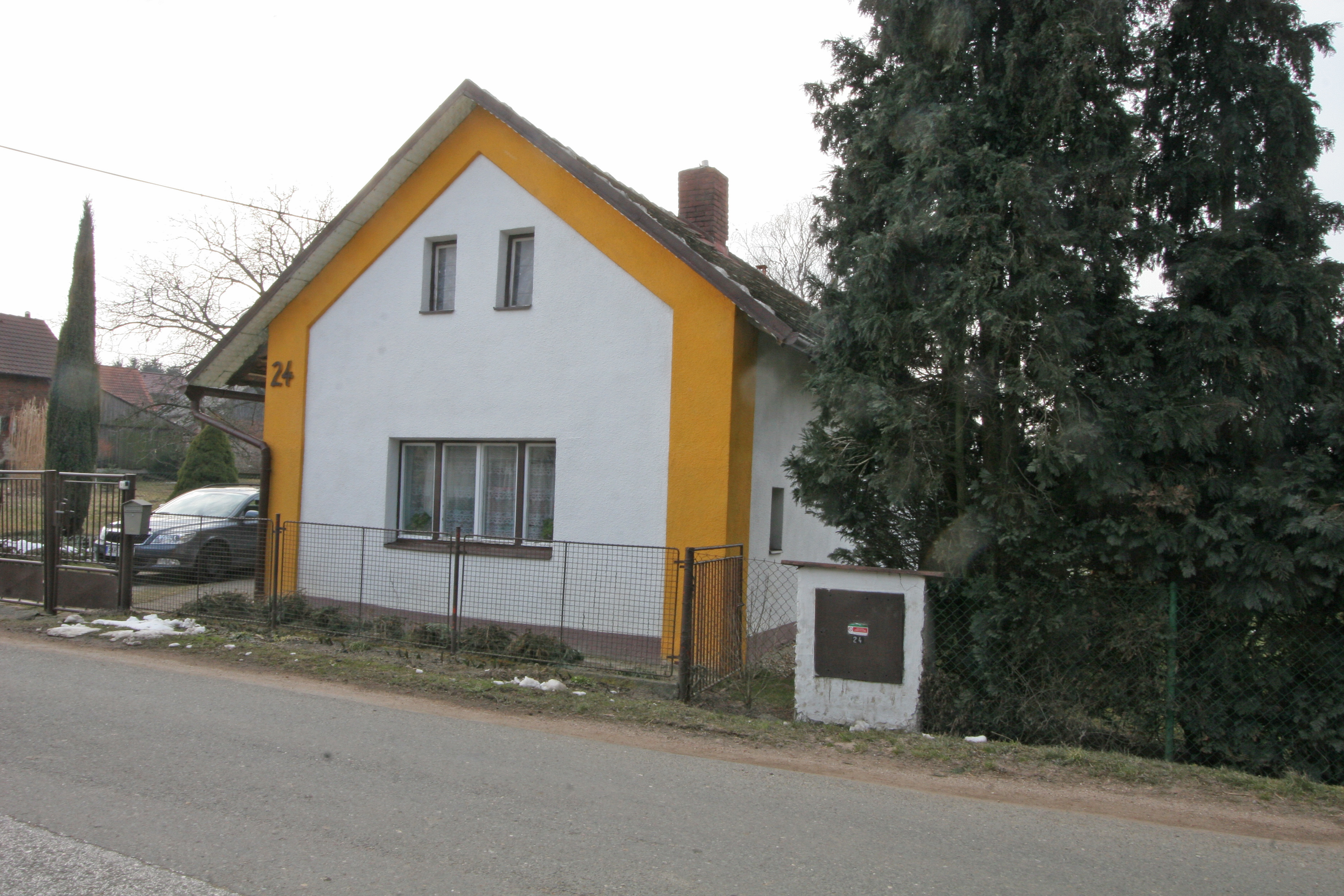 Stračovská Lhota - Zavadilka čp. 24